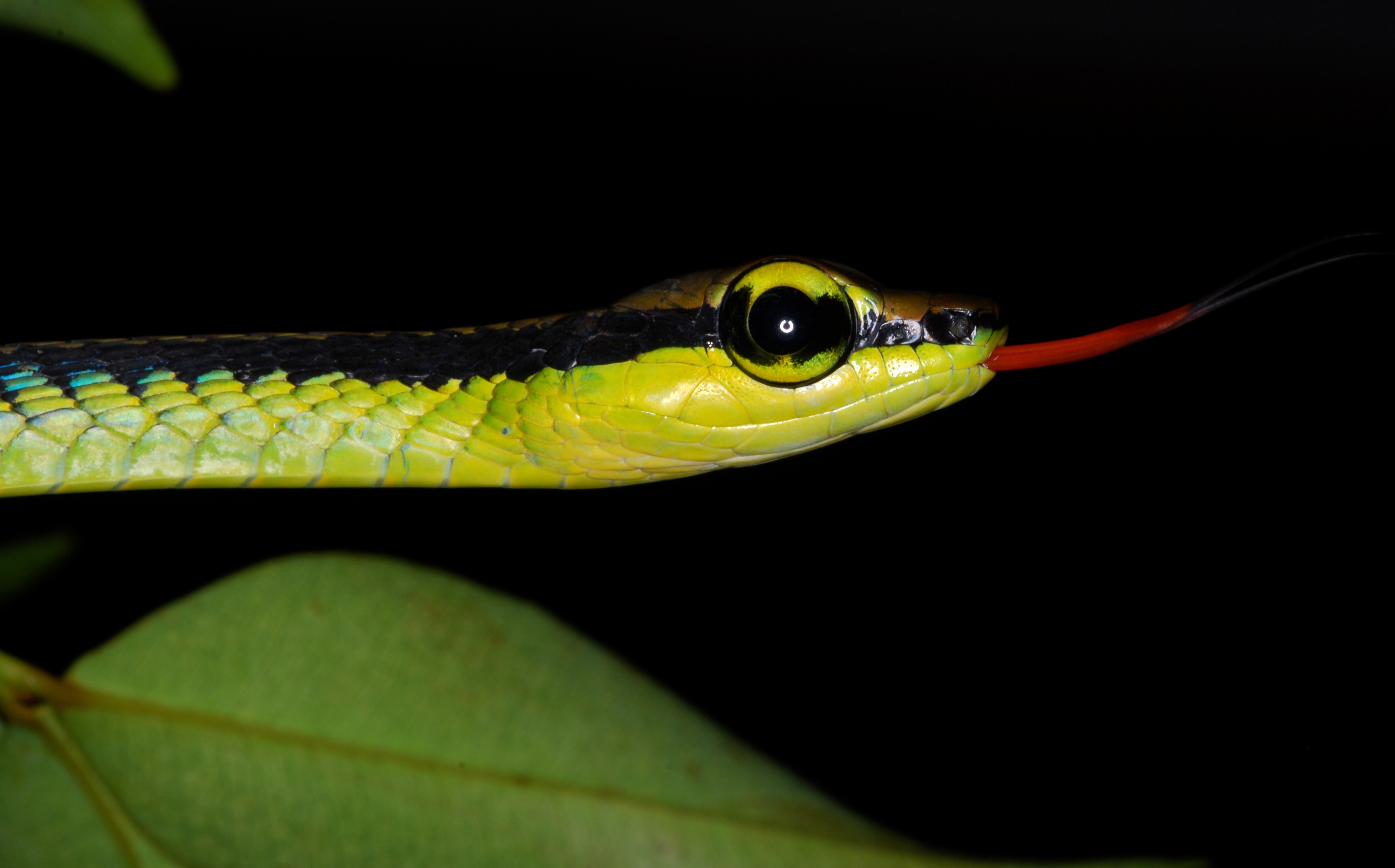 Taman Negara NP, Pahang, MALAYSIA